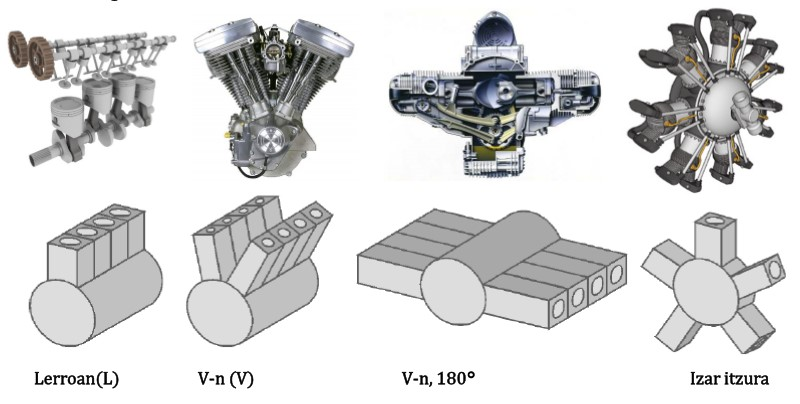 Zilindro kopurua eta horien orientazioa